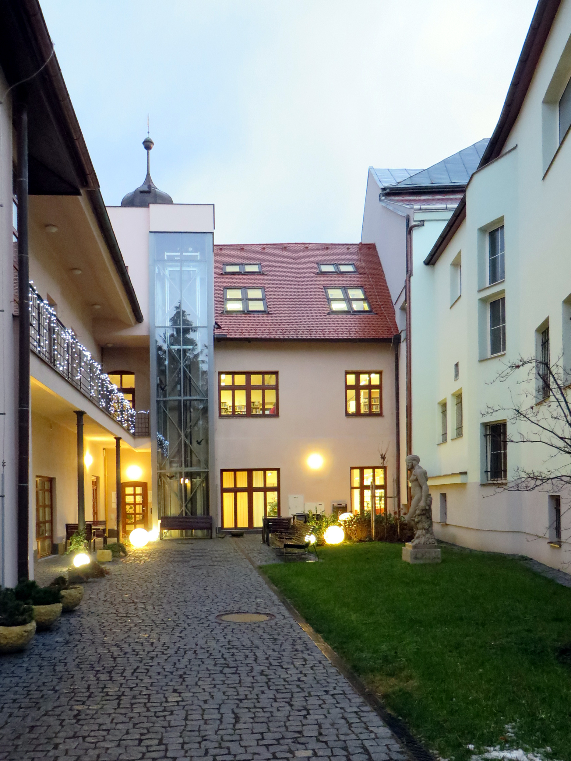 Poděbradská knihovna po rekonstrukci.